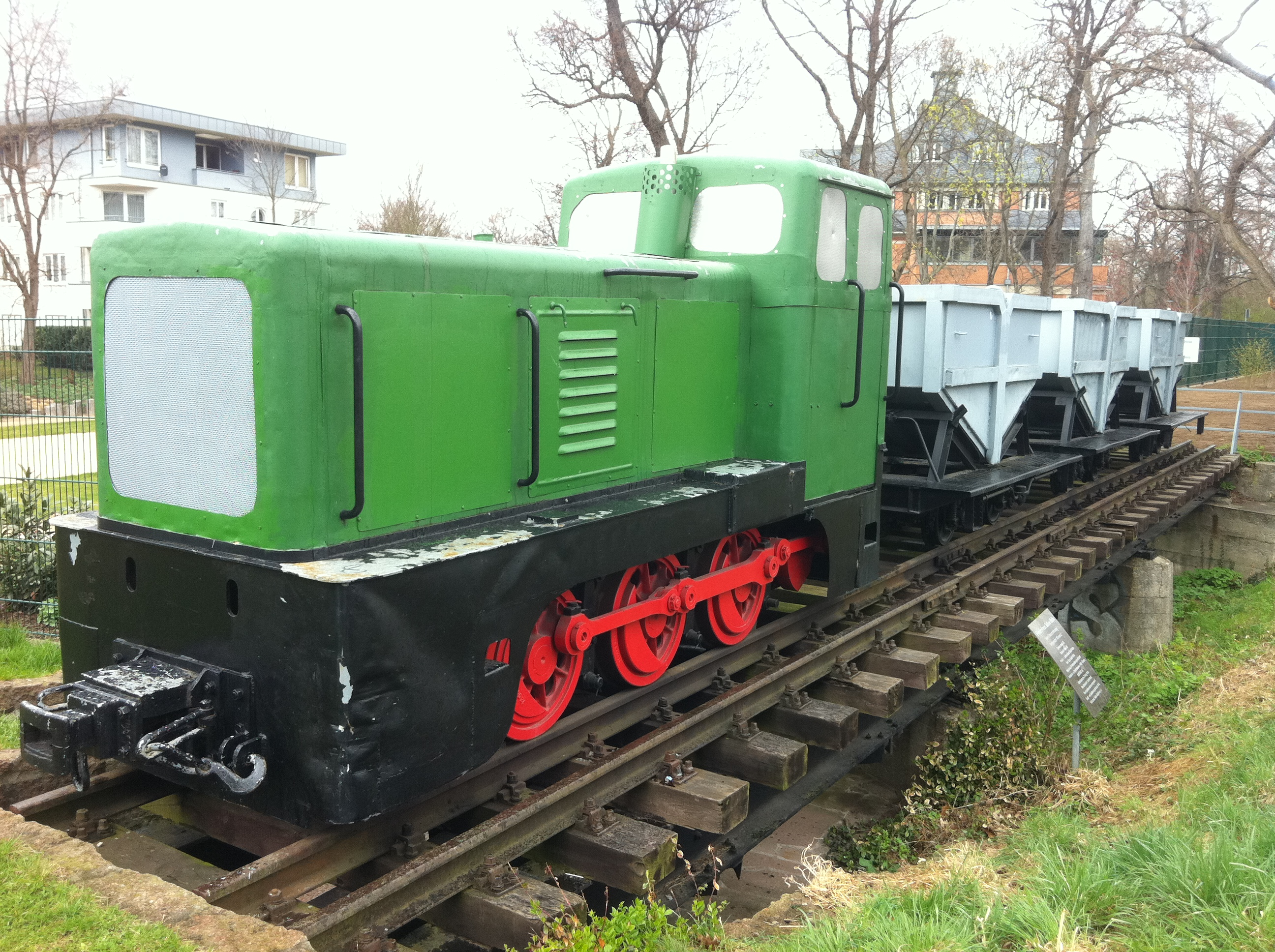 Denkmal an die Kohlebahn zur Saline in Halle. Die Lokomotive und die Wagen stehen auf einer Flutbrücke über den ehemaligen Kotgraben. Lok und Wages gehörten nie zur Pfännerschaftlichen Kohlebahn (nicht historisch). Die Spurweite der Wagen passt nicht zum Gleis, sie stehen nur mit den Außenkanten der Radsätze auf der Fahrfläche.